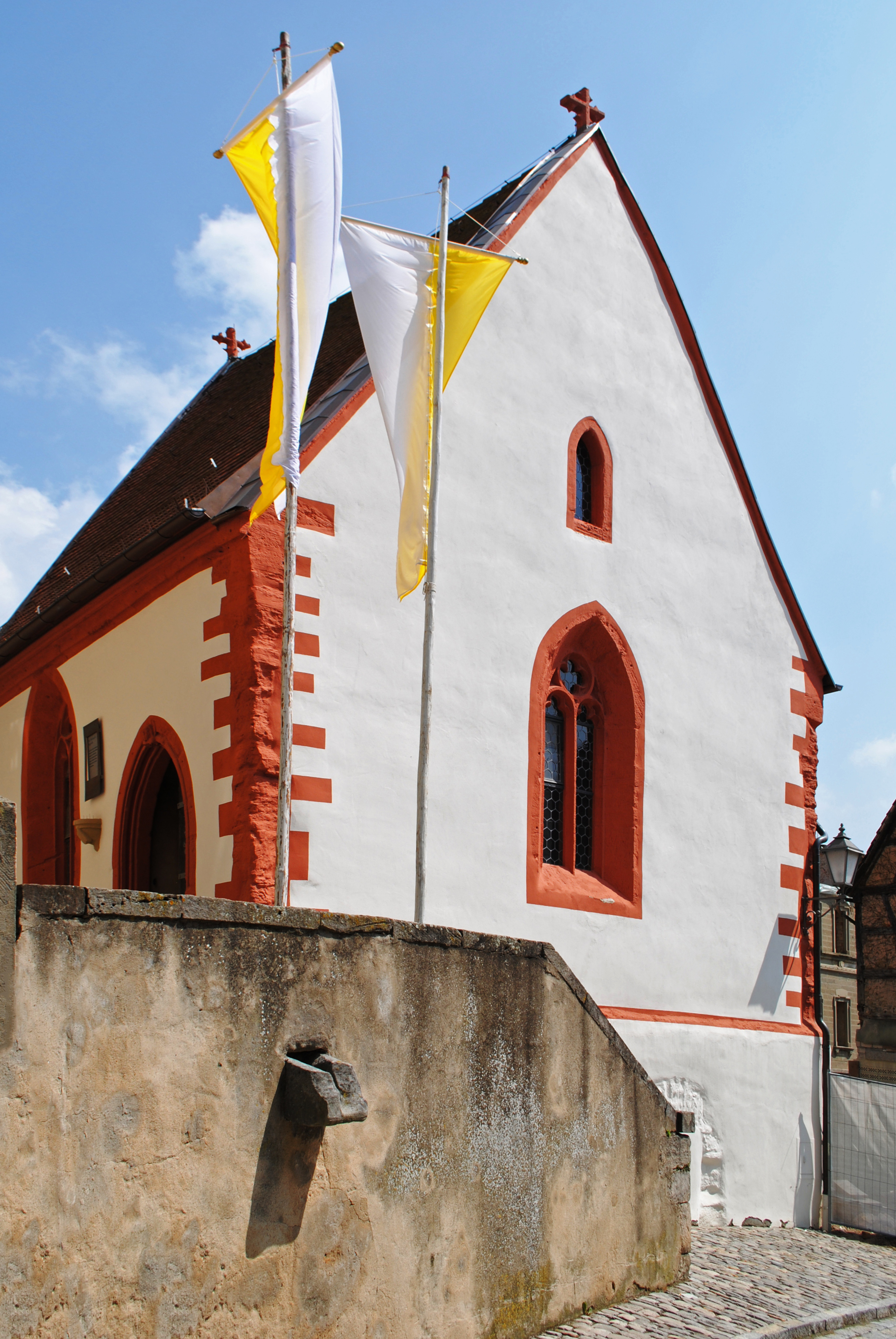 Michaelskapelle, Iphofen, Friedhofskapelle und Beinhaus